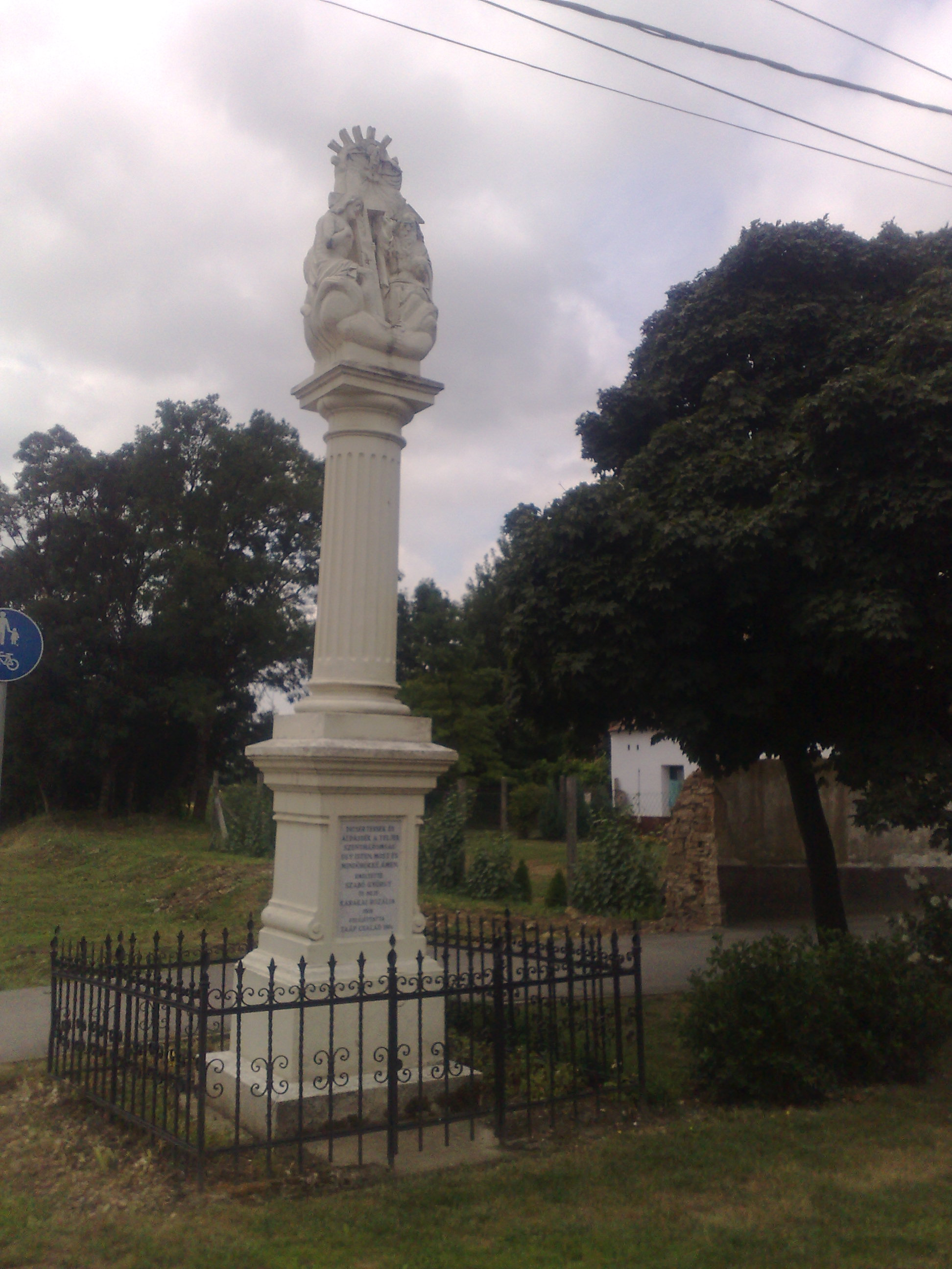 Szany - Szentháromság-szobor